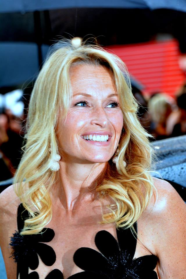 Estelle Lefébure au festival de Cannes